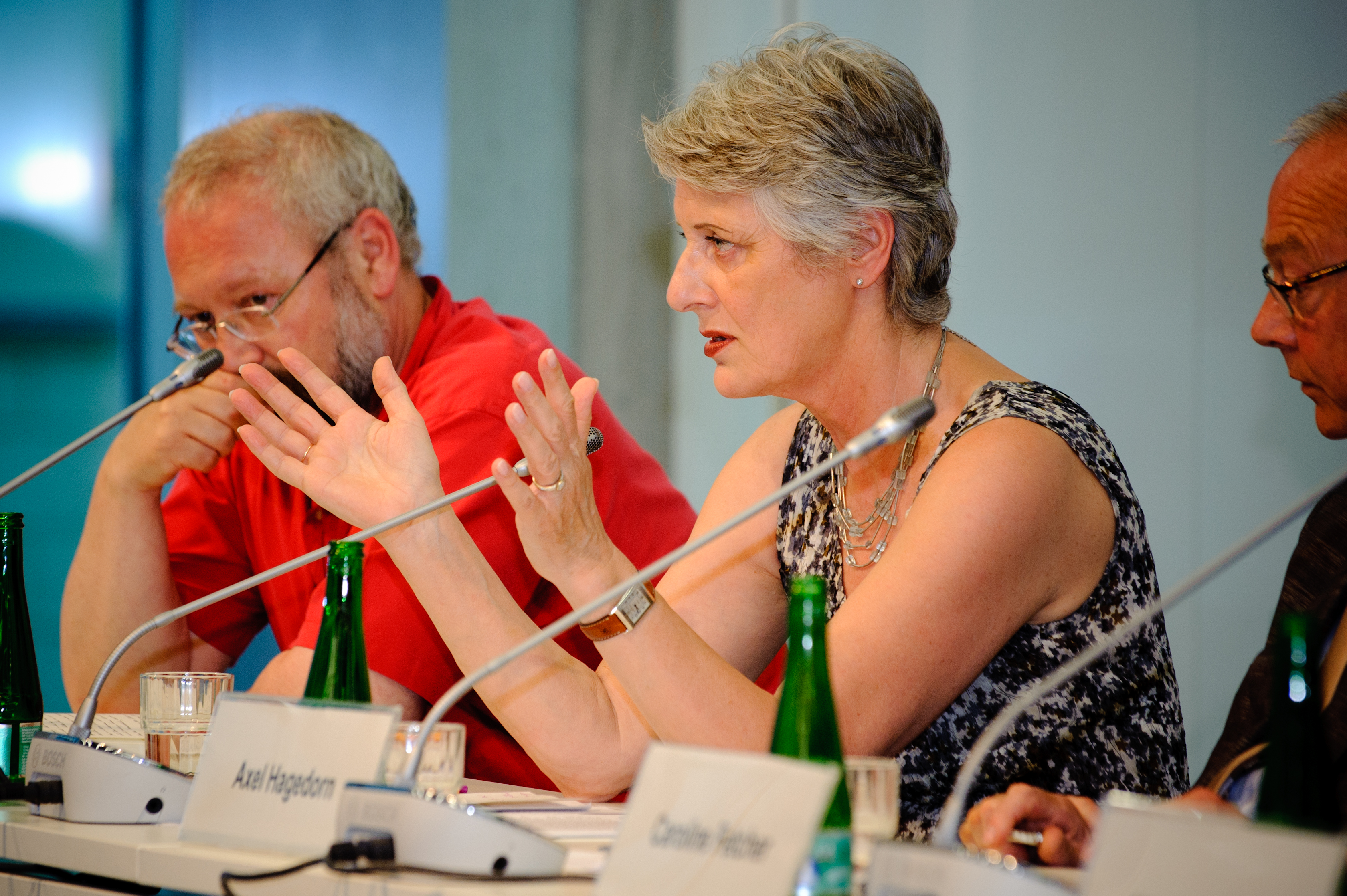 Dieses Foto entstand auf der Podiumsdiskussion "Die UNO und der Völkermord von Srebrenica" am 5. Juli 2010 in der Heinrich-Böll-Stiftung in Berlin. Foto: Stephan Röhl